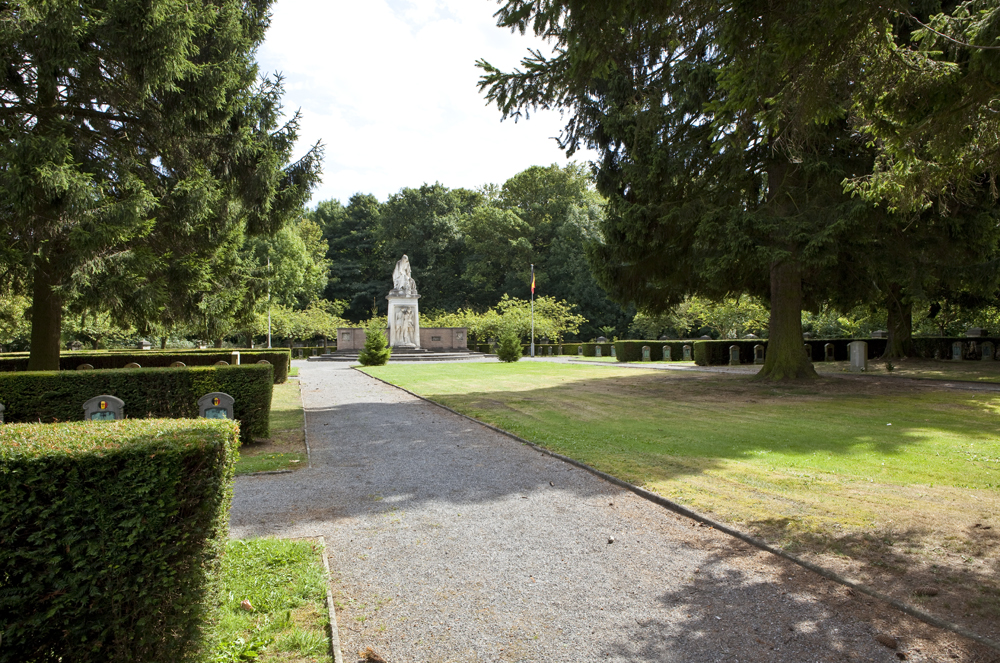 Le cimetière militaire de Champion, qui abrite les dépouilles de soldats belges et français de la guerre de 14-18.